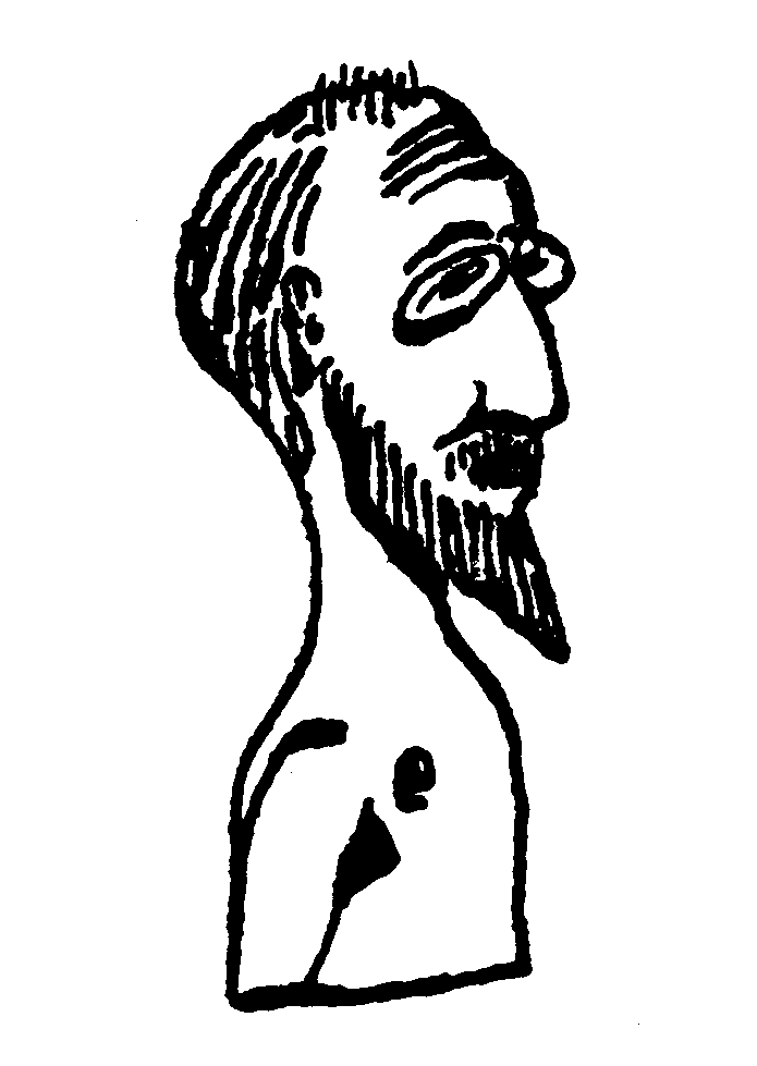 Autoportrait d'Erik Satie pour illustrer "L'esprit musical"